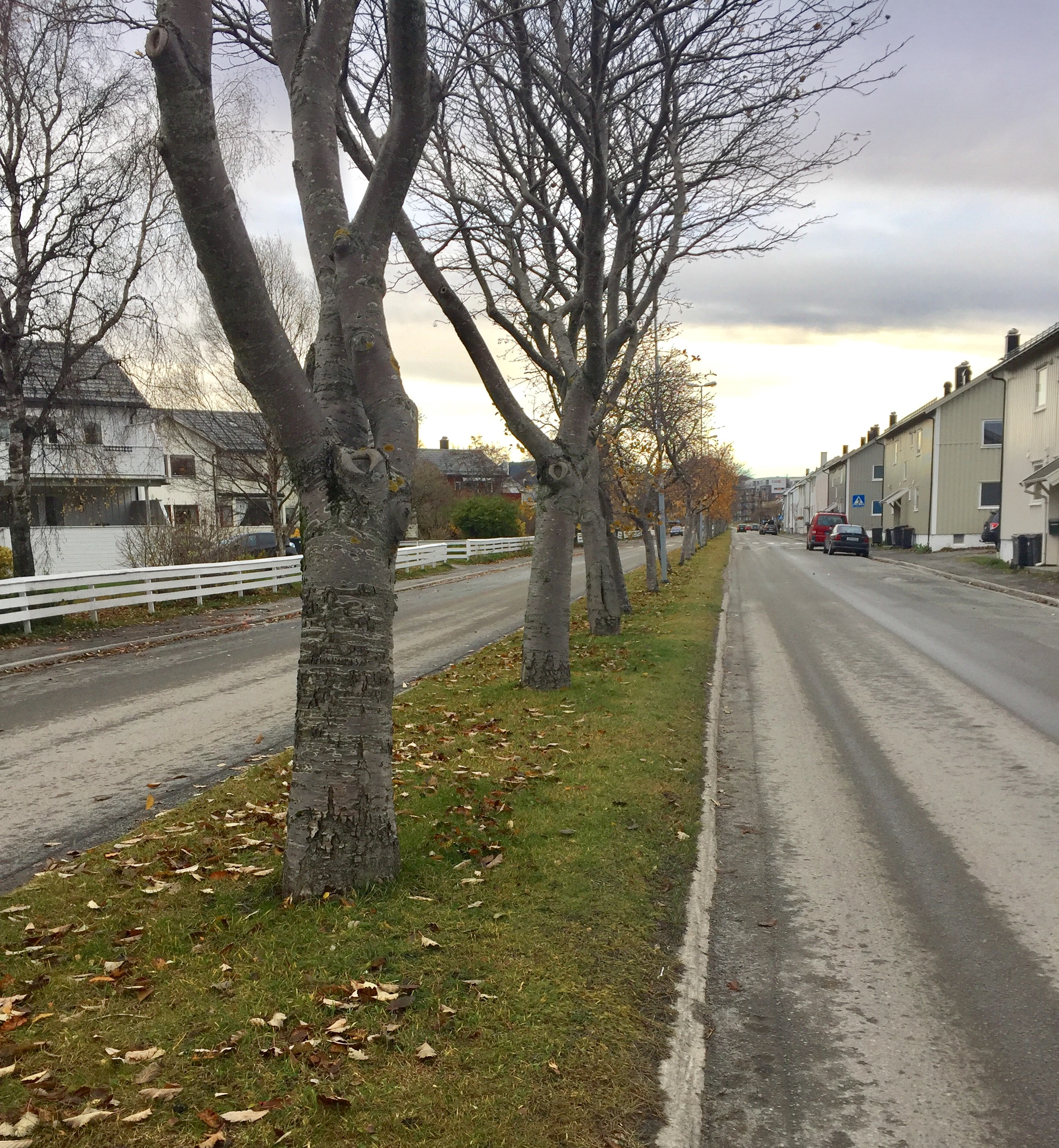 Midtdeler med beplantet gressplen.